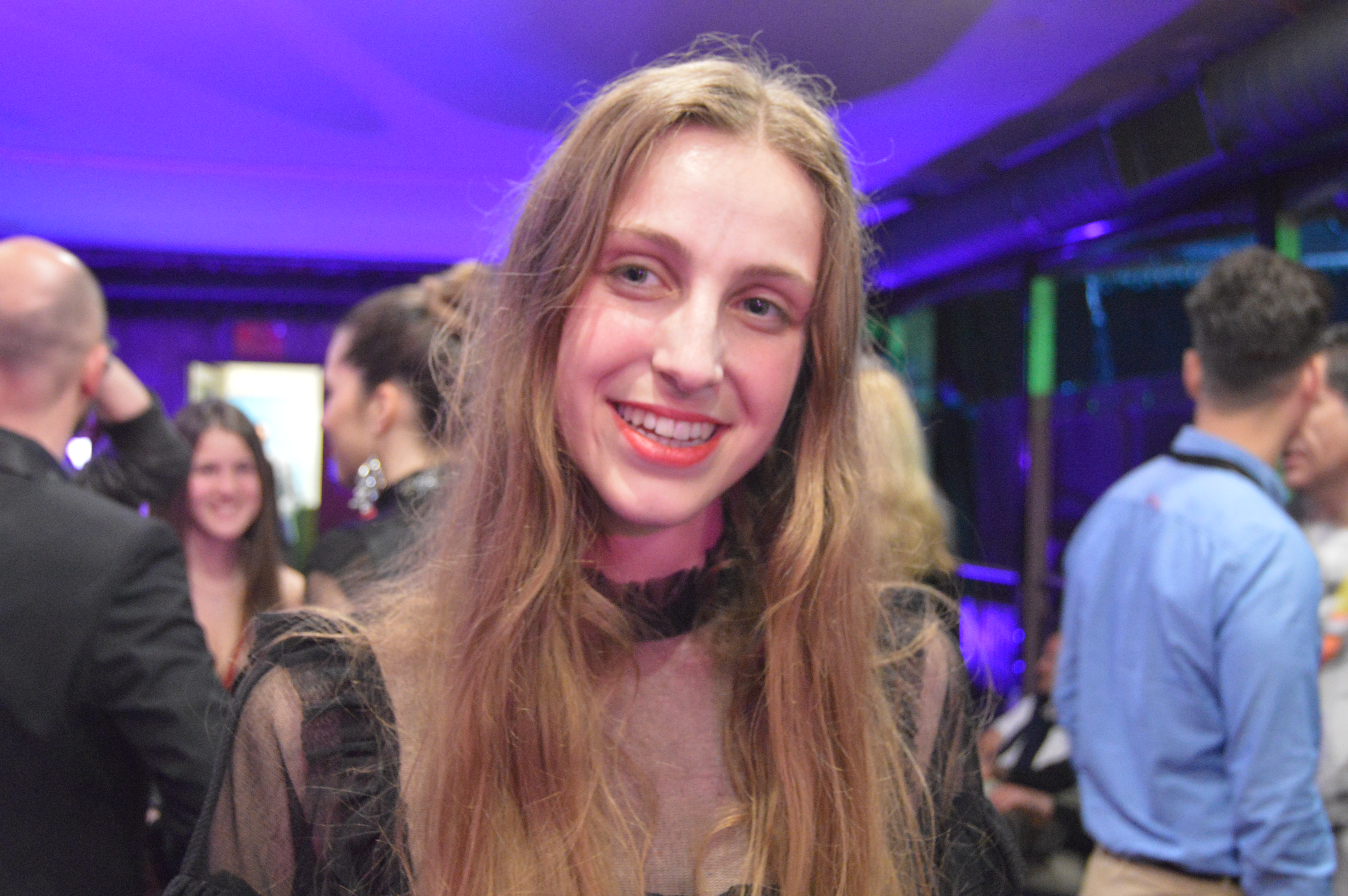 Sennek from Belgium at the Eurovision Spain PreParty in Madrid (April 2018)